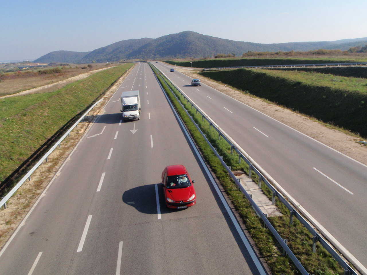 Umfahrung von Márkó bei B8 Strasse